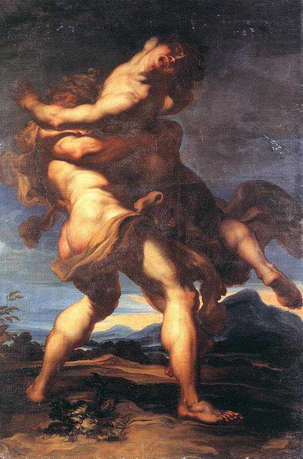 Heracles and Antaeuslabel QS:Lru,"Геракл и Антей" label QS:Lde,"Herkules und Antaeus" label QS:Len,"Heracles and Antaeus" label QS:Lpl,"Herkules i Anteusz" label QS:Lfr,"Héraclès et Antée"